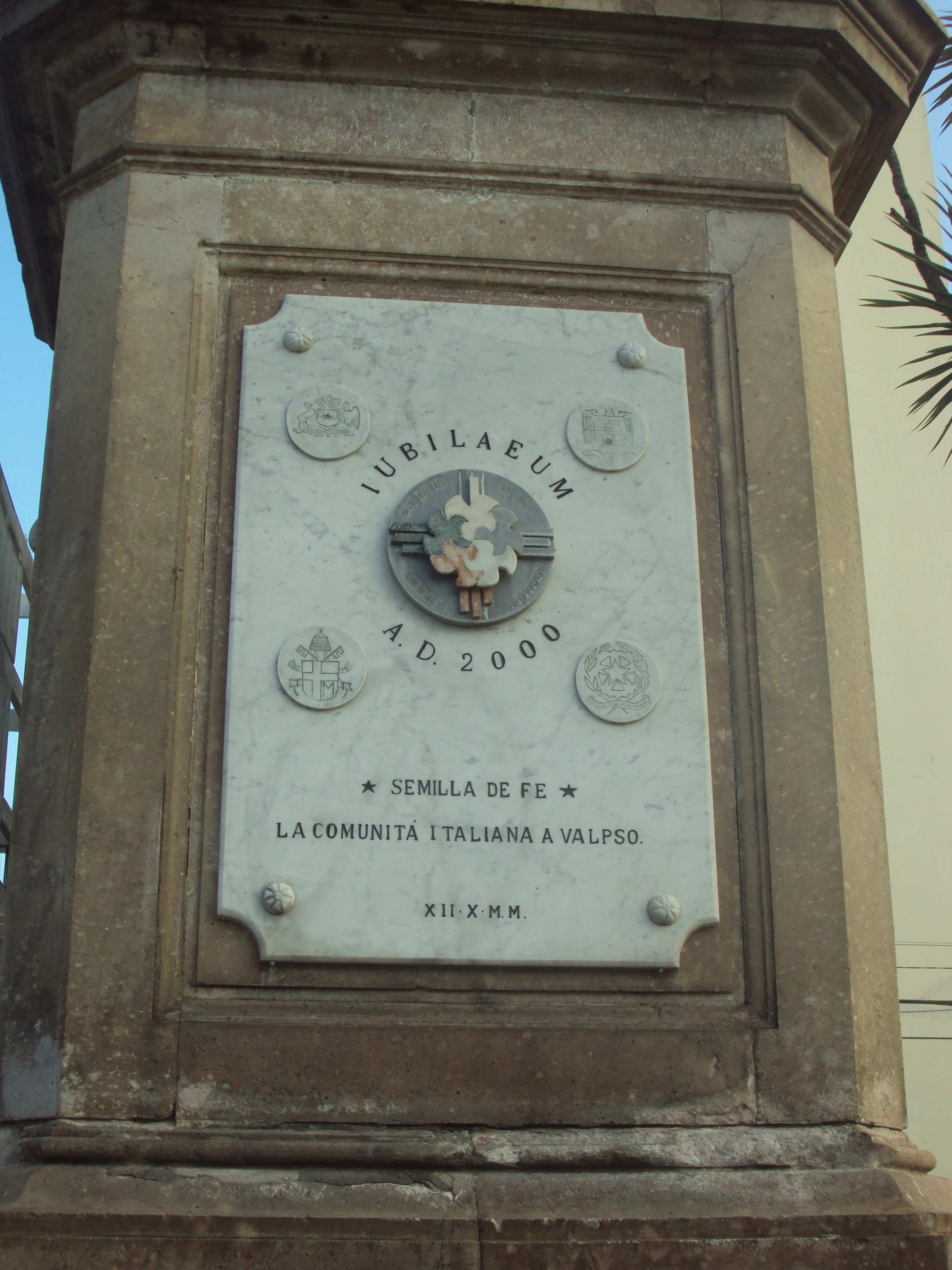 Logotipo del Jubileo de 2000, en la estatua de Cristobál Colón, en Valparaíso.